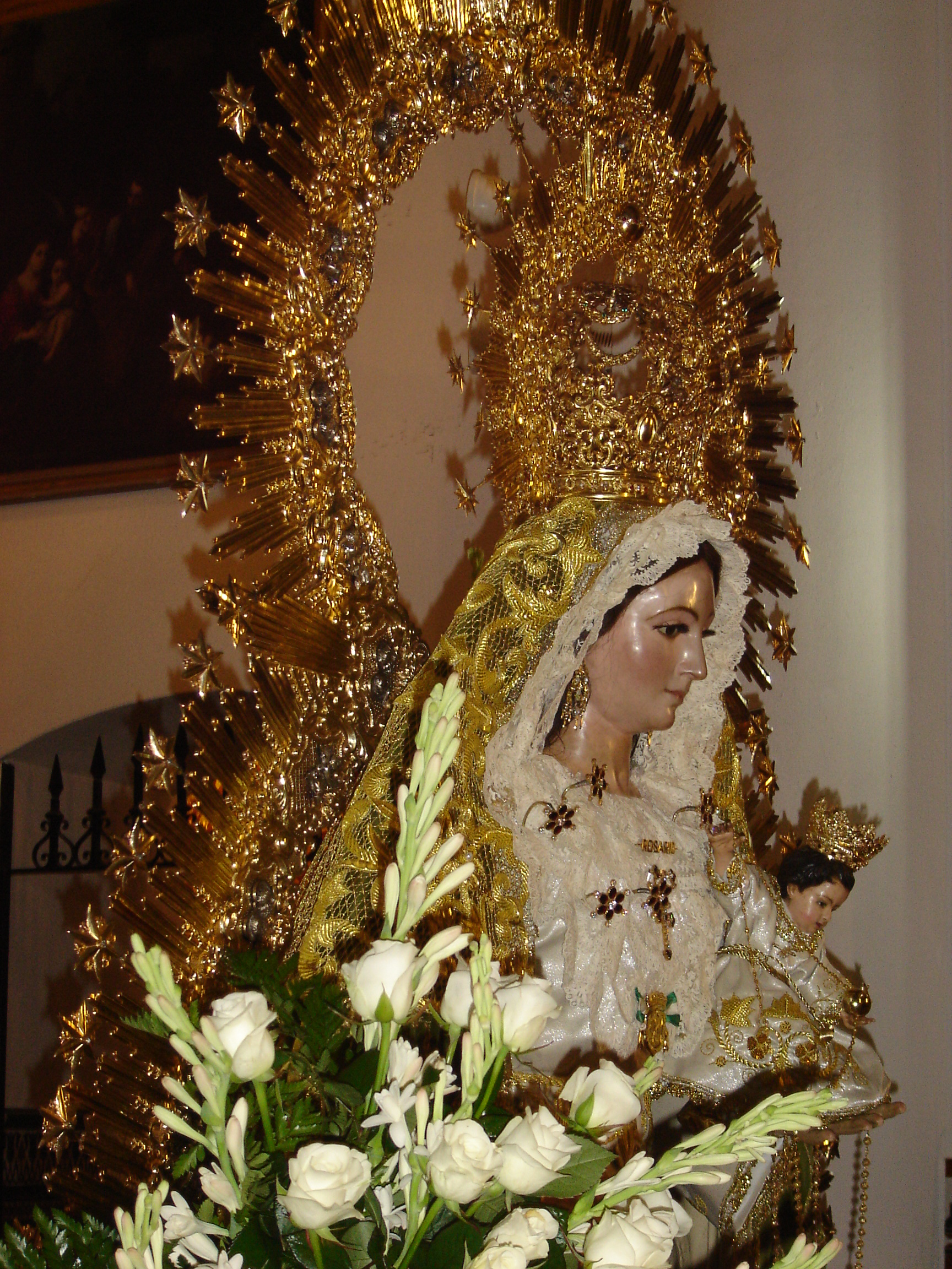 La Hermandad de Nuestra Señora del Rosario está establecida canonicamente en la Iglesia Parroquial de San Ildelfonso en 1615